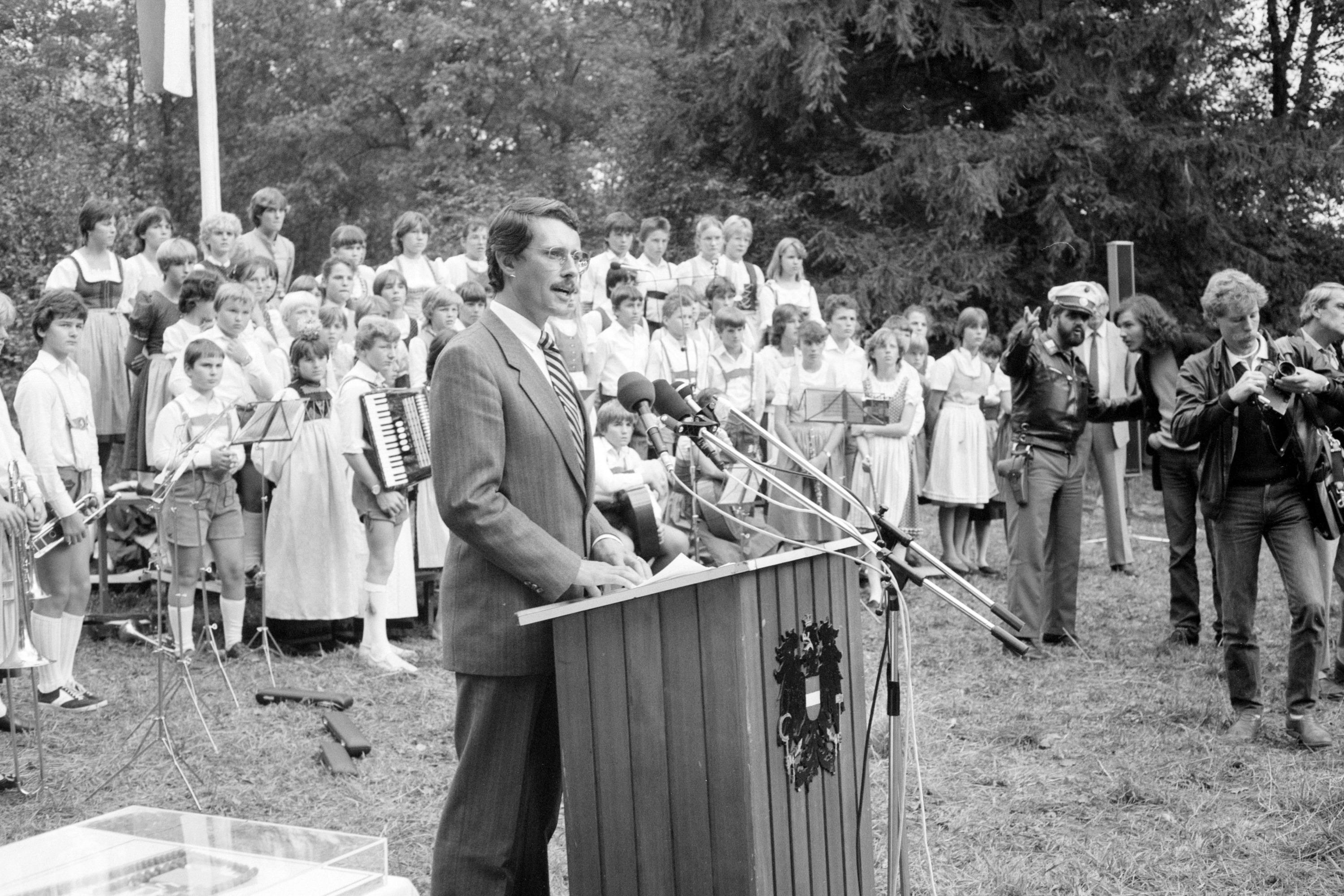 Der damalige österreichische Verteidigungsminister Friedhelm Frischenschlager bei einer Rede anlässlich der Vertragsunterzeichnung zur Errichtung der Walgaukaserne in Bludesch (Vorarlberg) am 4. Oktober 1984.